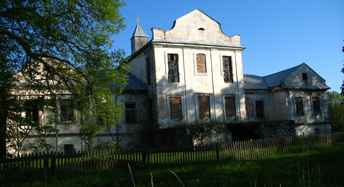 Беларуская (тарашкевіца): Лявонпаль